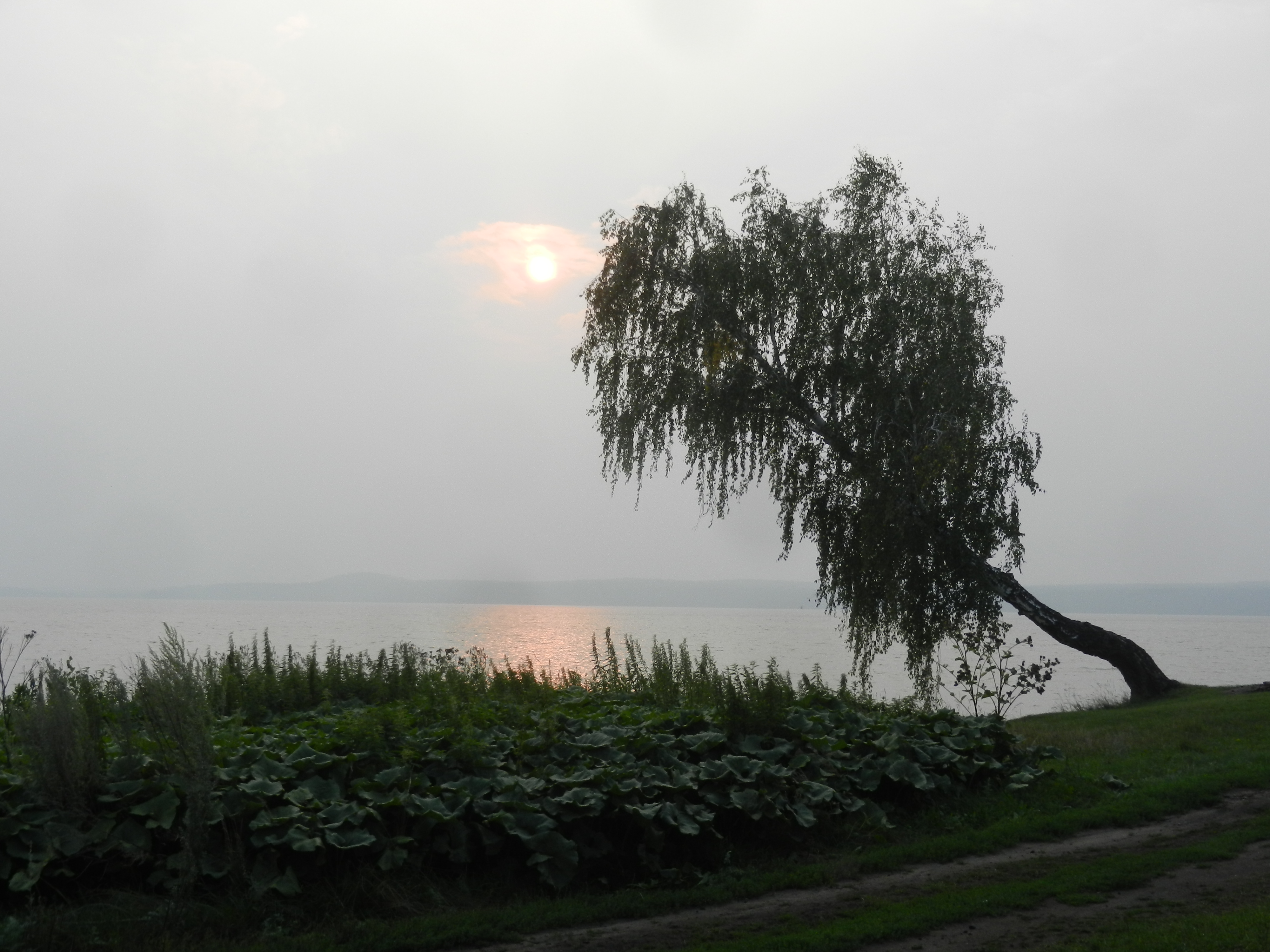 озеро Окункуль